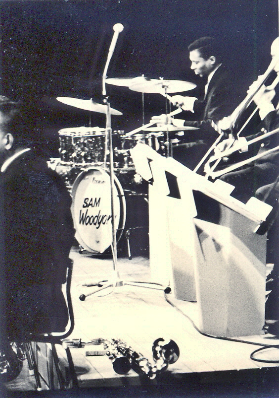 Sam Woodyard 06.02.65 JHH